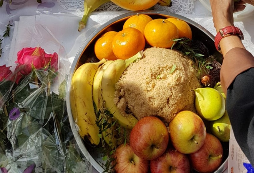 קהילת הדור החדש